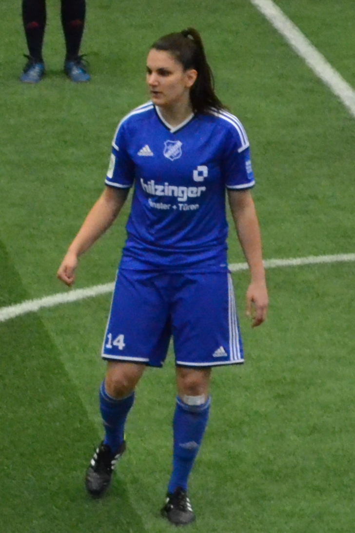 Jovana Damnjanović (SC Sand) beim SAP Frauen-FußballCup 2016